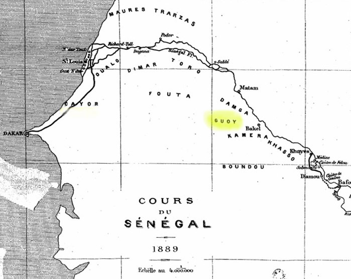 Localisation du Guoy sur une carte du fleuve Sénégal (1889) dans Eugène Béchet, Cinq Ans de séjour au Soudan français, E. Plon, Nourrit, Paris, 1889, après la page 270